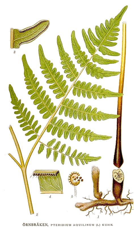 Original Description Örnbräken, Pteridium aquilinum (L.) Kuhn.